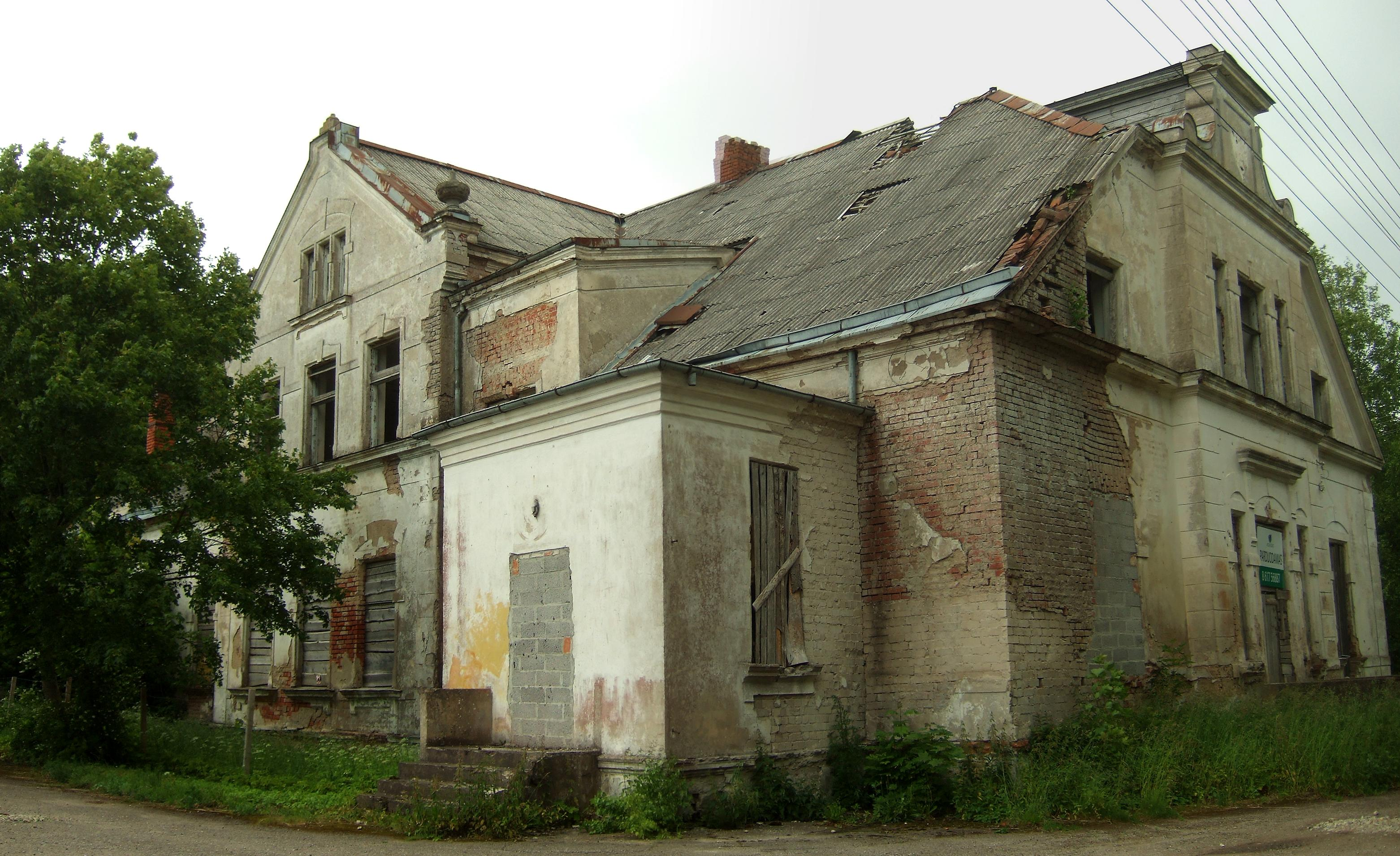 Laukžemės dvaras iš šiaurės vakarų ir pietvakarių pusės